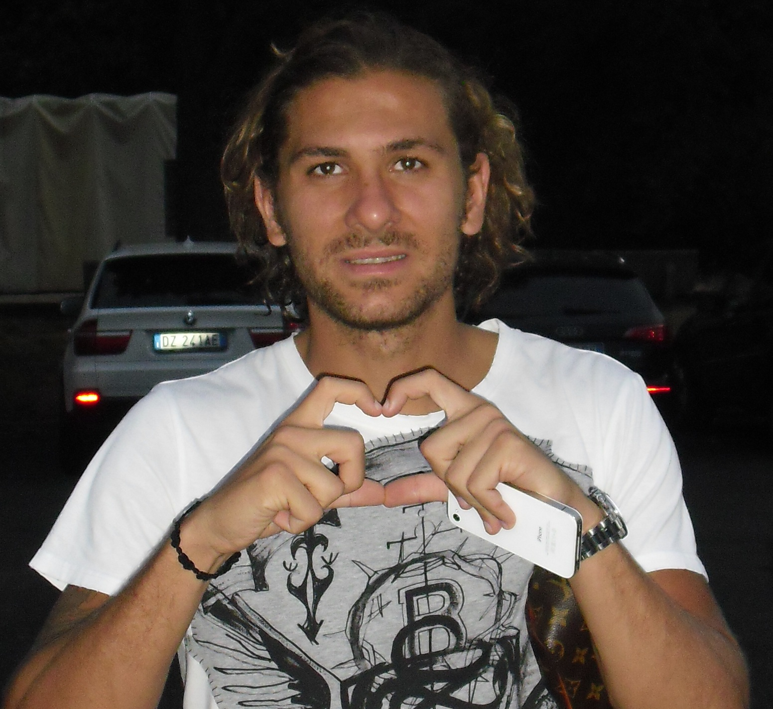 Foto scattata personalmente a Cerci